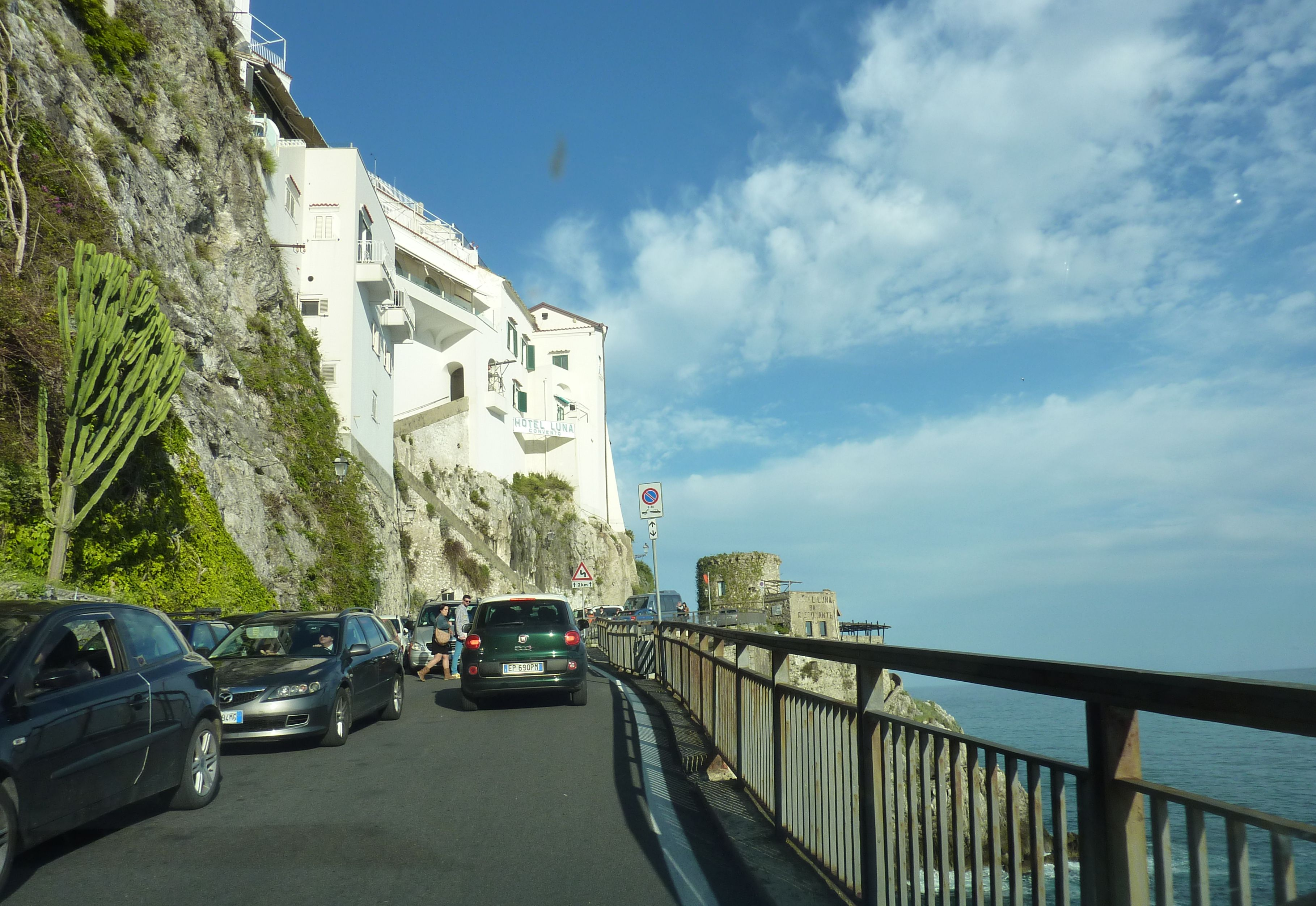 Hotel Luna in Amalfi